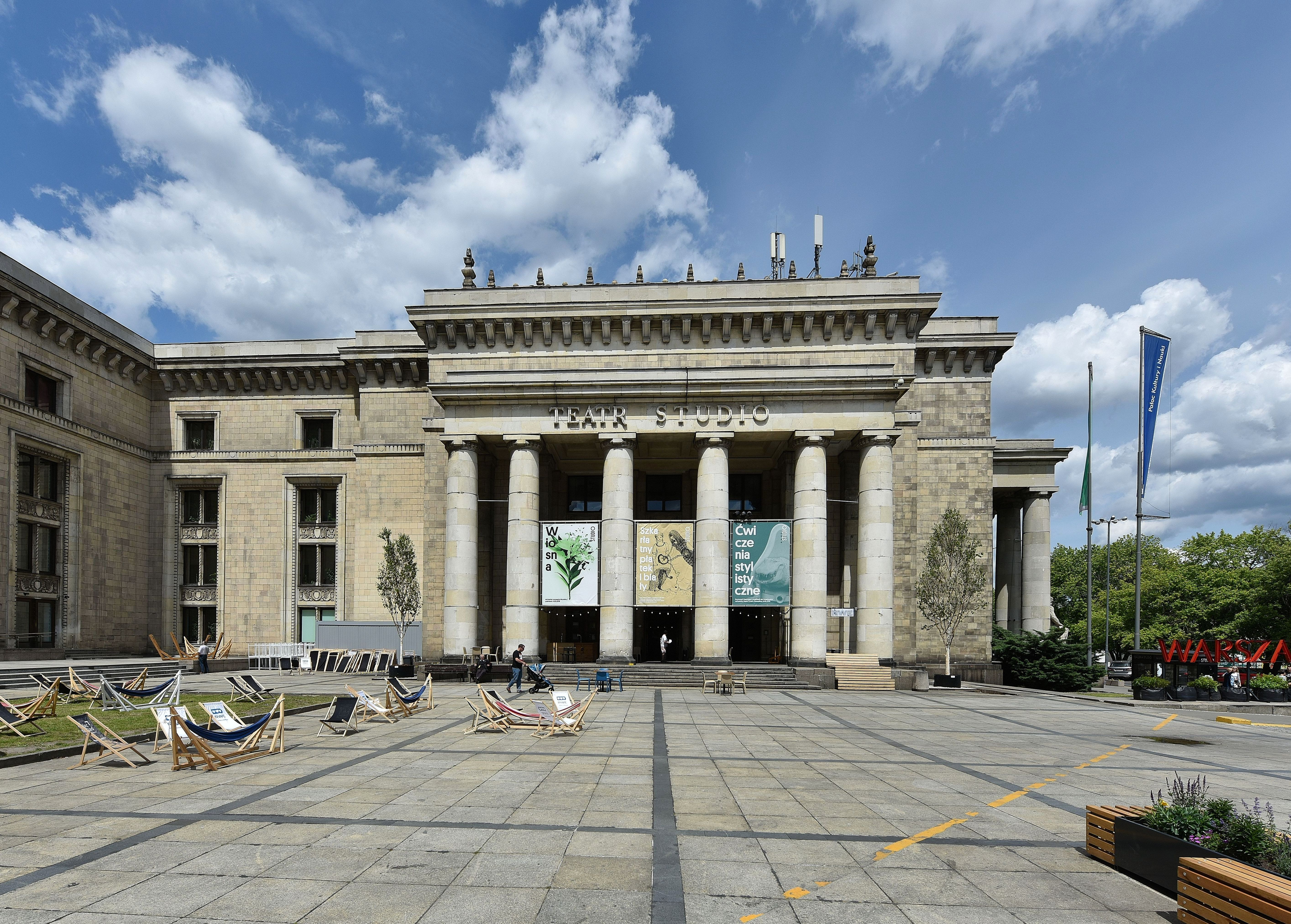 Teatr Studio w Warszawie